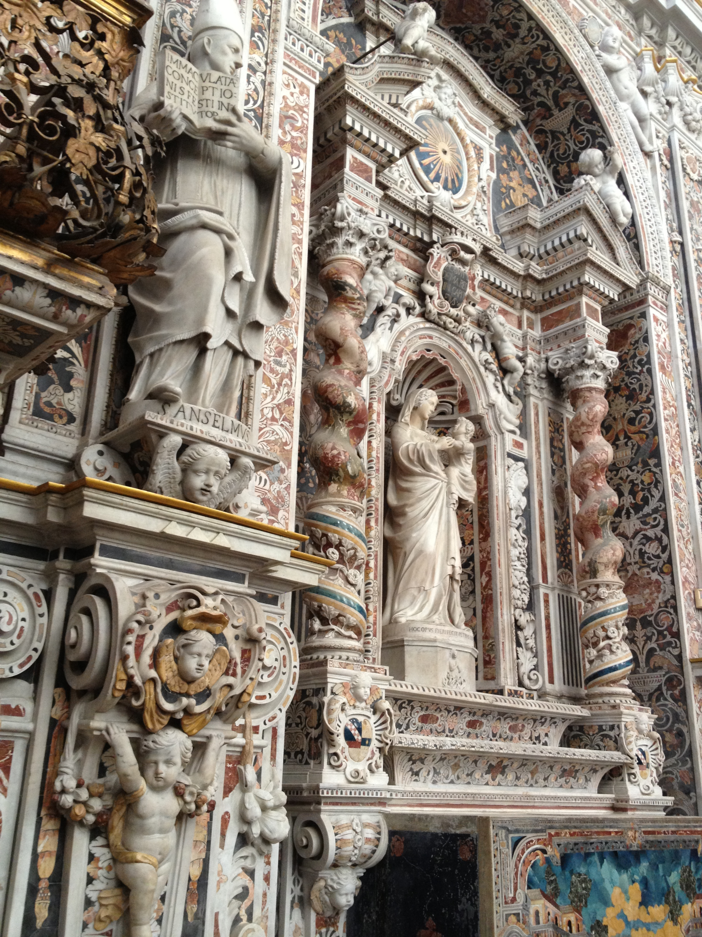 Chiesa dell'Immacolata Concezione al Capo